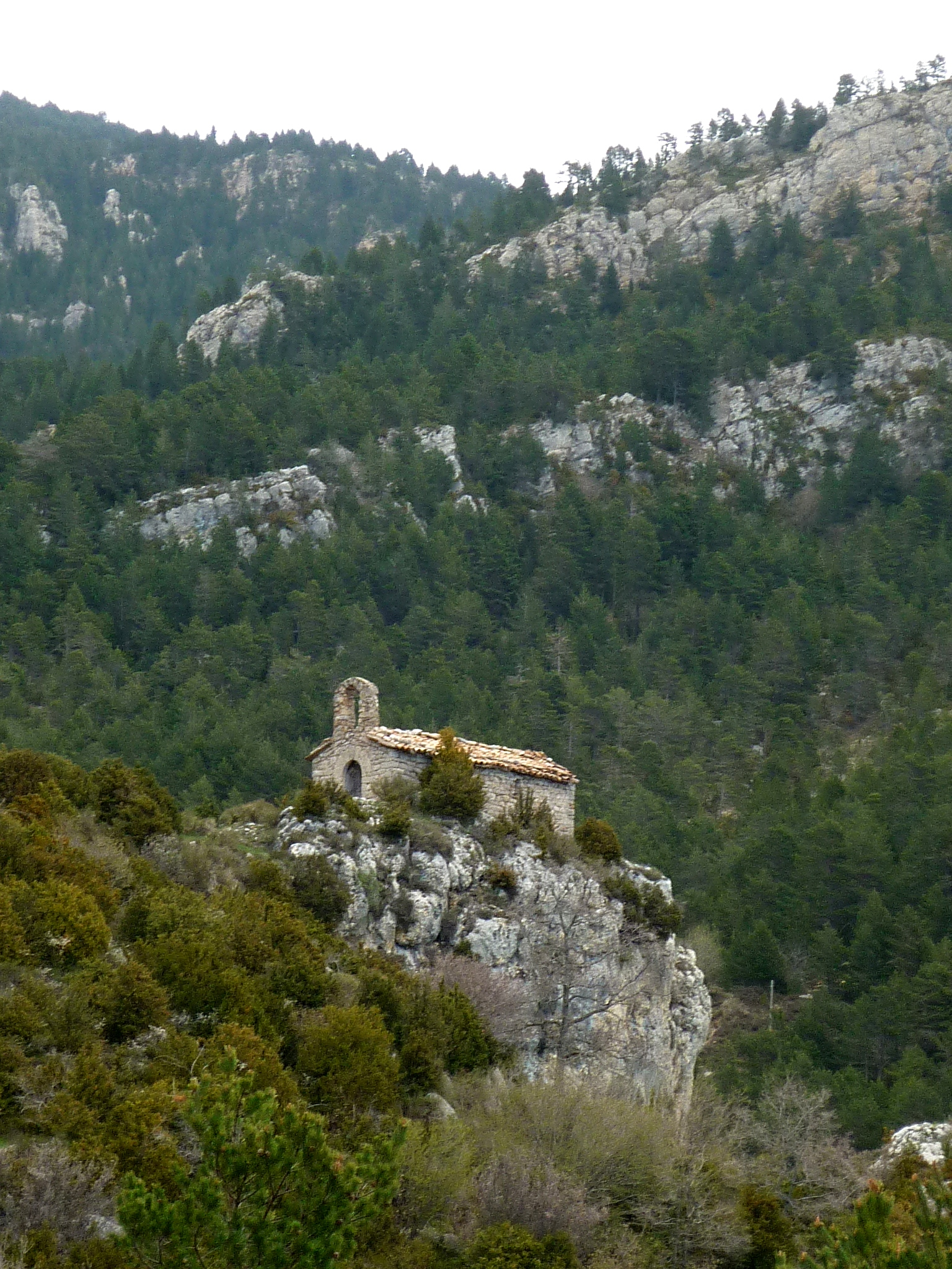 Sant Llorenç dels Porxos (Castellar del Riu)